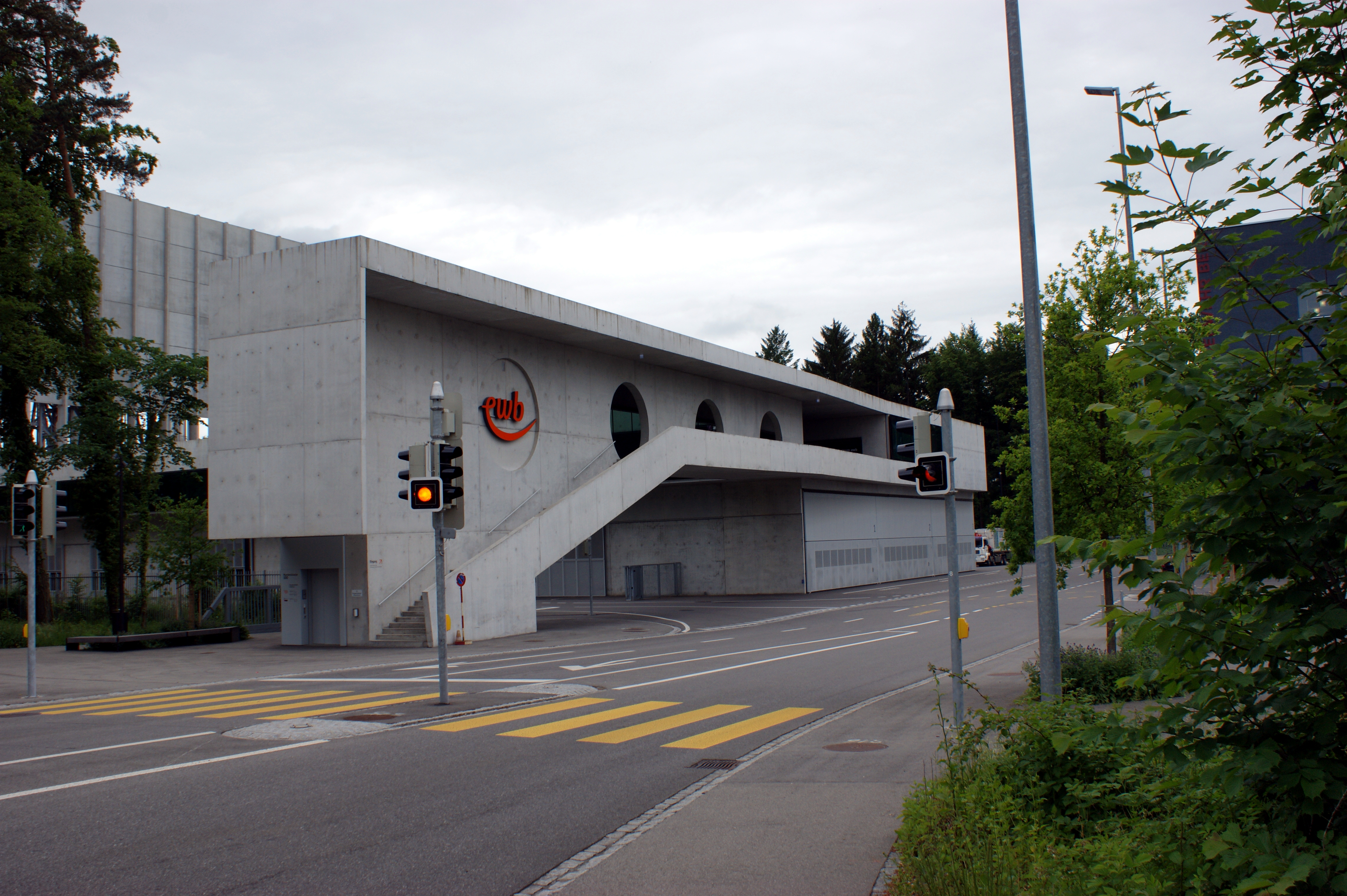 Zufahrt ewb/KVA, Murtenstrasse 100, 3008 Bern